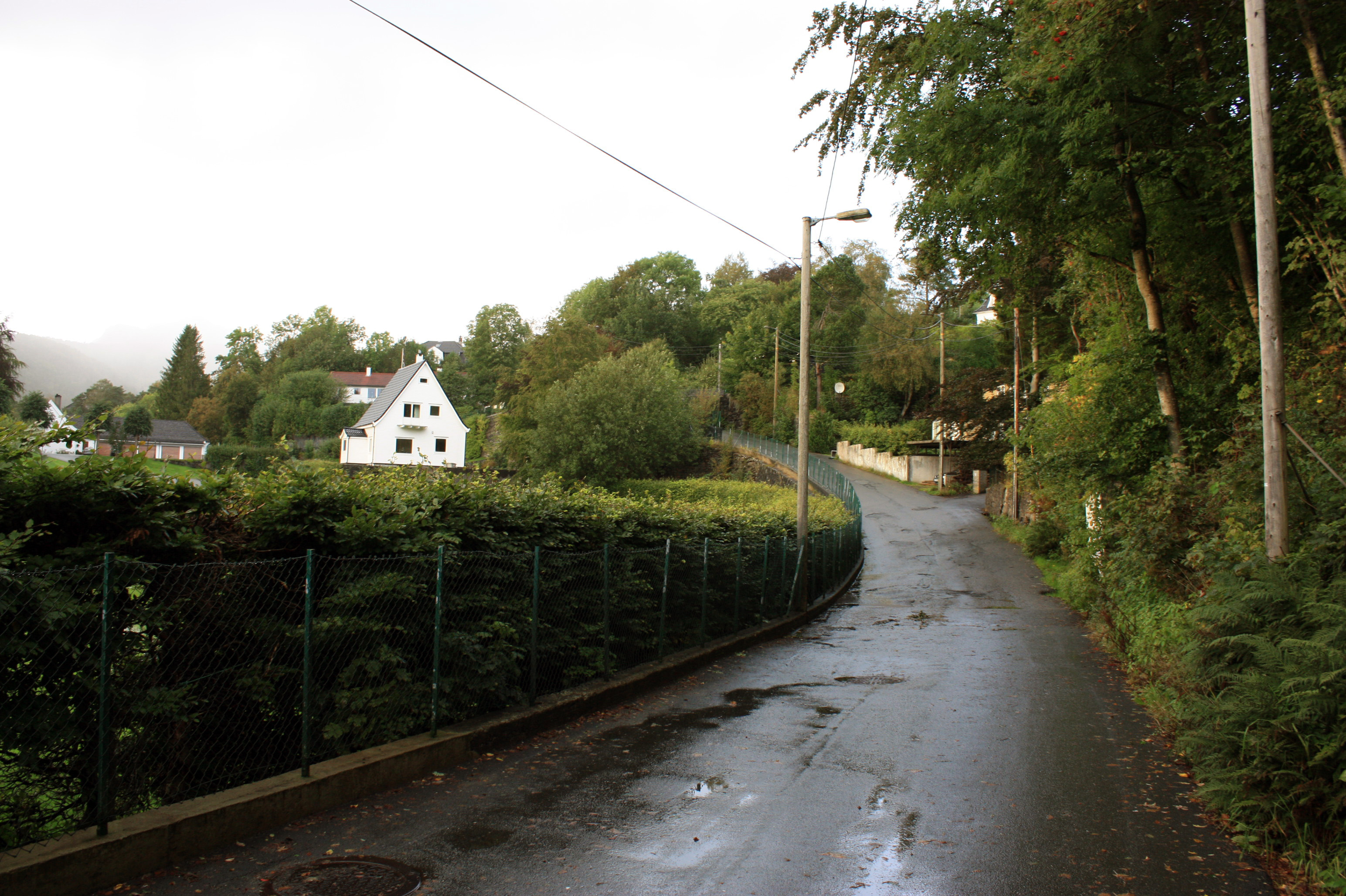 Jacob Kjødes veg, Fana, Bergen.